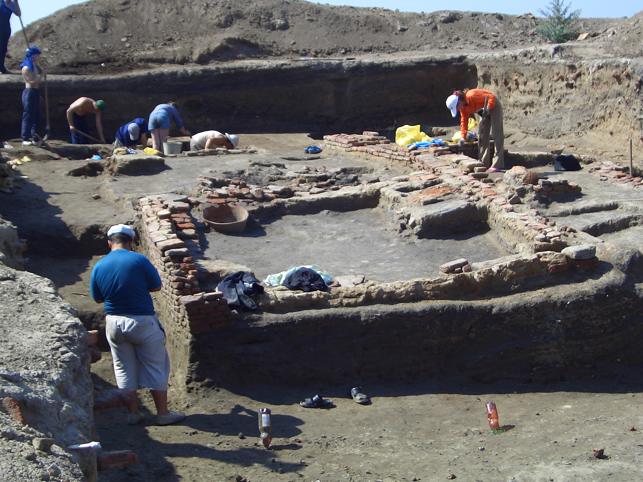 Самосдельское городище 2006 сооружение 11 века